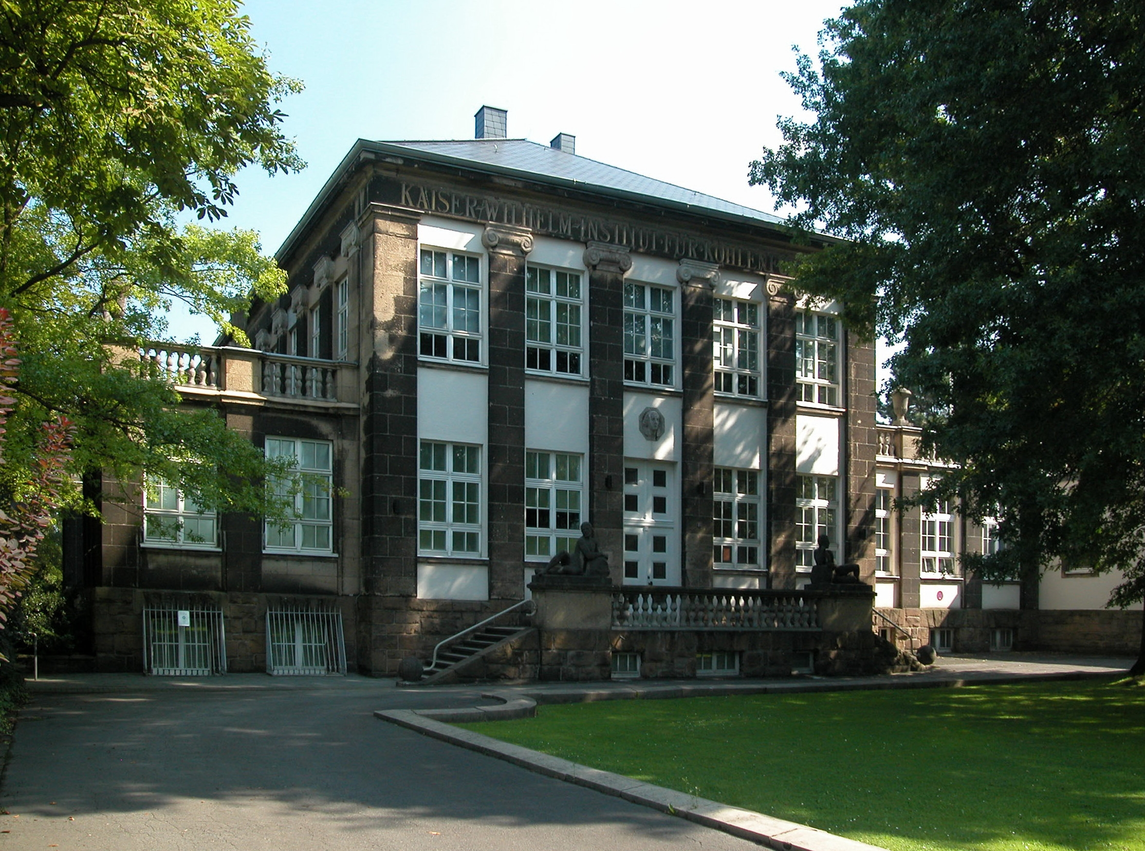 Max-Planck-Institut für Kohlenforschung in Mülheim Kamera-Position: 51°24′58.90″N 6°53′5.26″E / 51.416361°N 6.8847944°E Blick nach Nord-Ost